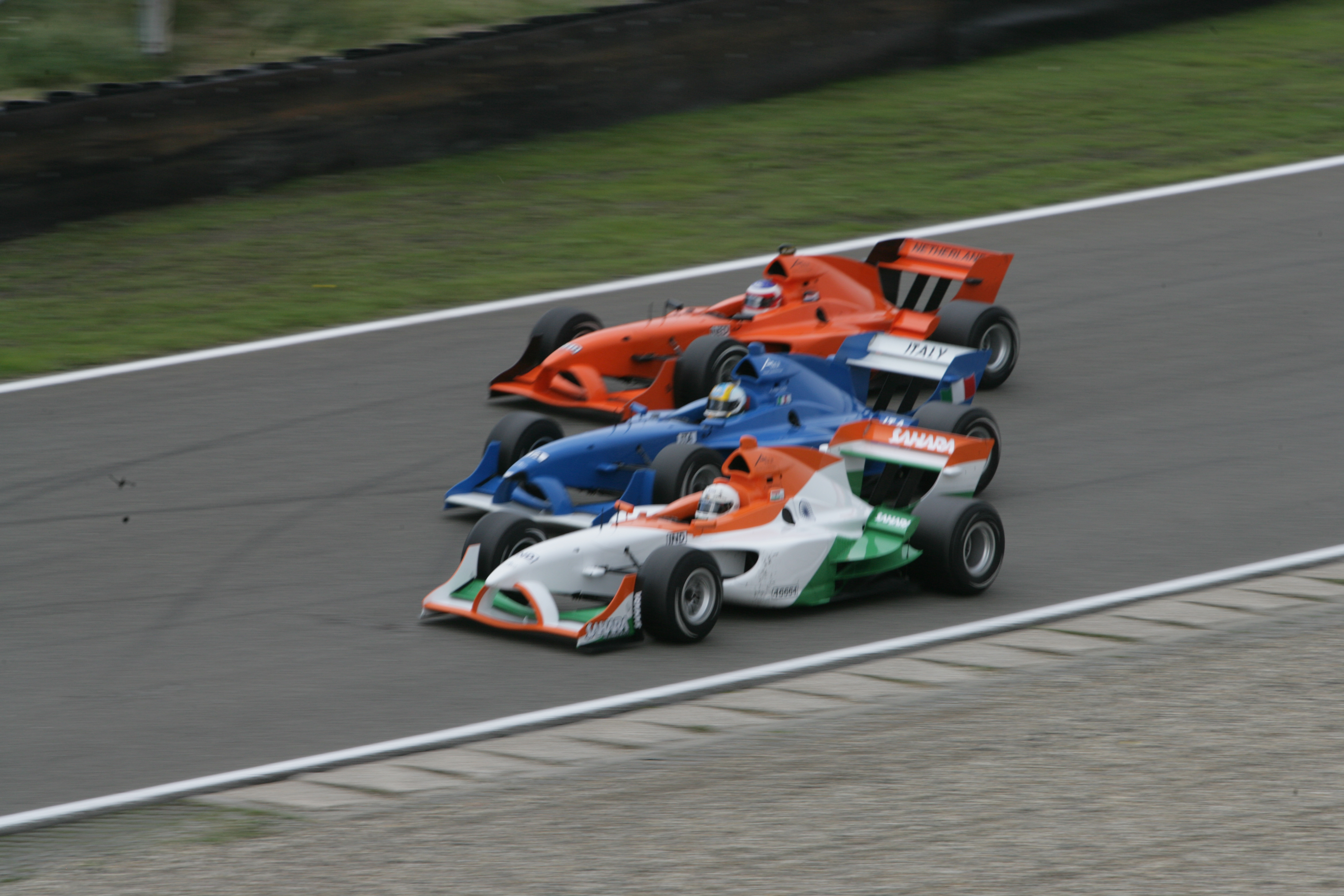 Inhaal actie van Jeroen Bleekemolen in de auto van Team Nederland op Team Italie en Team India tijdens de A1GP feature race op Circuitpark Zandvoort, 1 oktober 2006.